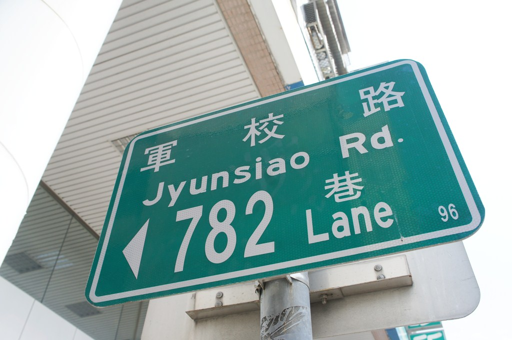 高雄市楠梓區軍校路782巷路標牌。